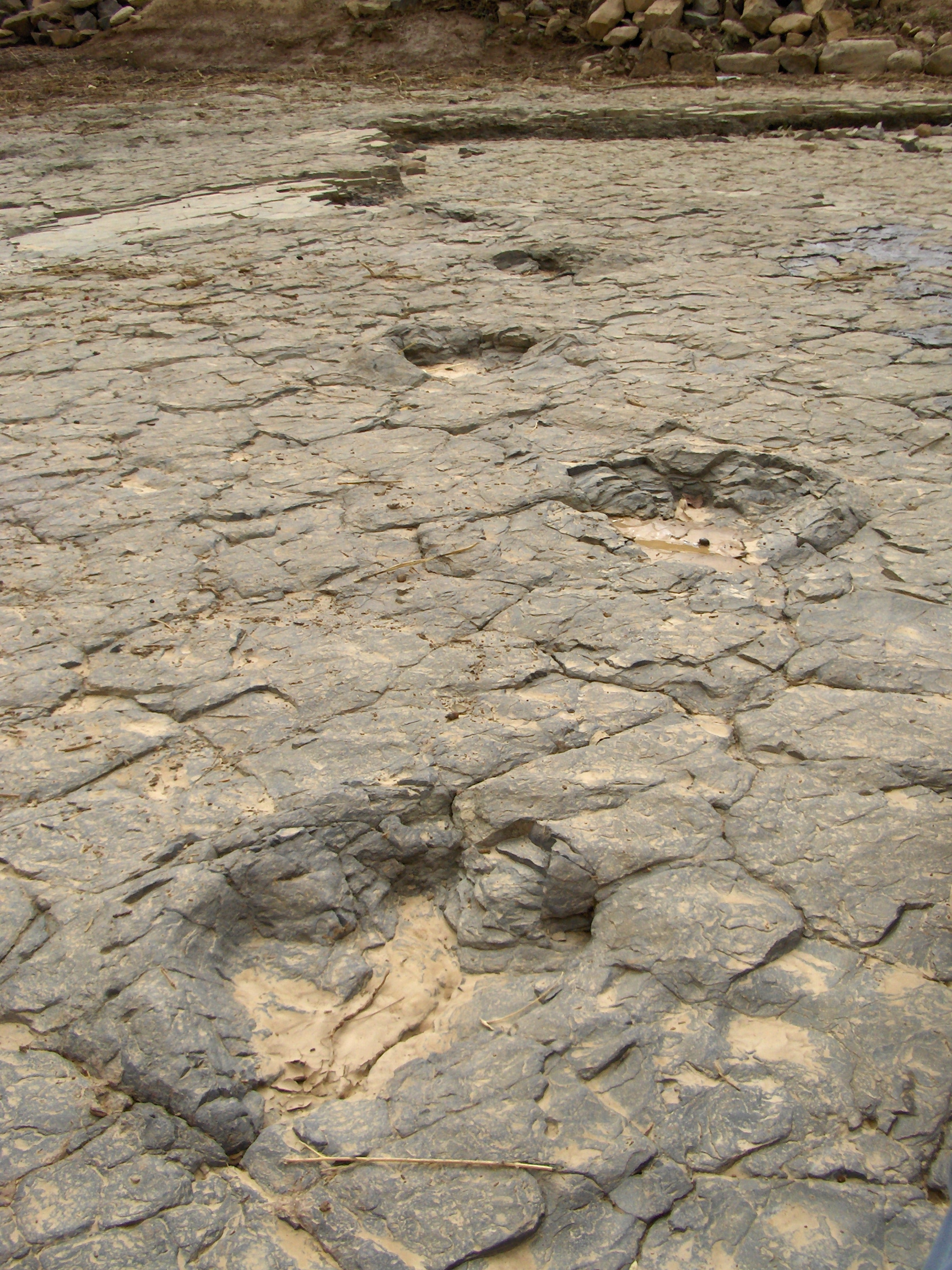 Licence: autorisation accordée: par le webmaster Mr Francis Boulbes Auteur et droits sur cette photo :Copyright © Francis Boulbes photo:Traces d'iguanodon